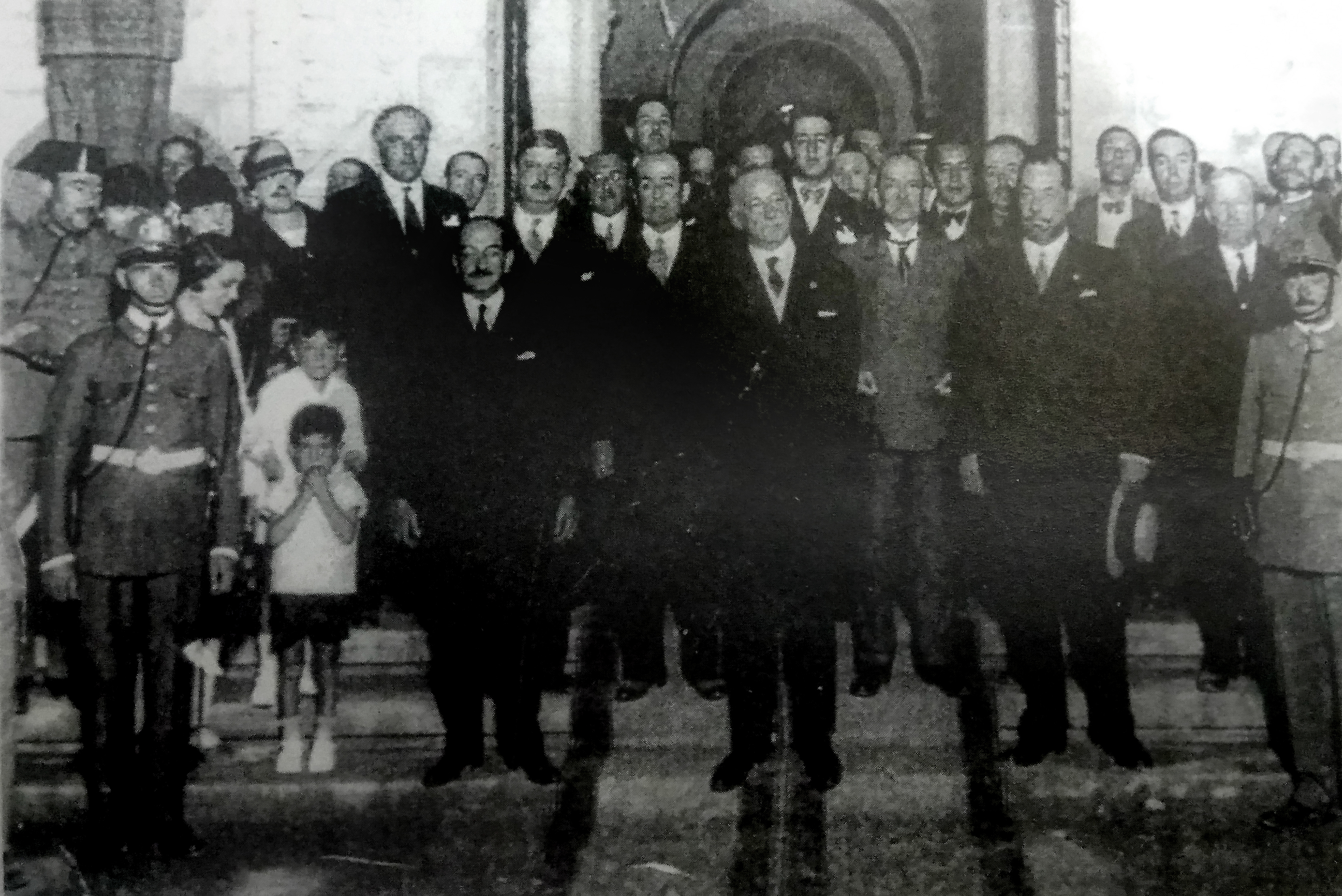 Sevilla. Fotografía tomada el 9 de mayo con motivo de la inauguración de la Exposición Iberoamericana de 1929-30. En la imagen, Miguel Primo de Rivera (centro), presidente del Consejo de Ministros, Román Silveira Nieto (primero por la izquierda), jefe de vigilancia del recinto, su esposa (Luisa García Pardo), sus hijos Guillermo (7 años) y Luis (c. 5), etc.